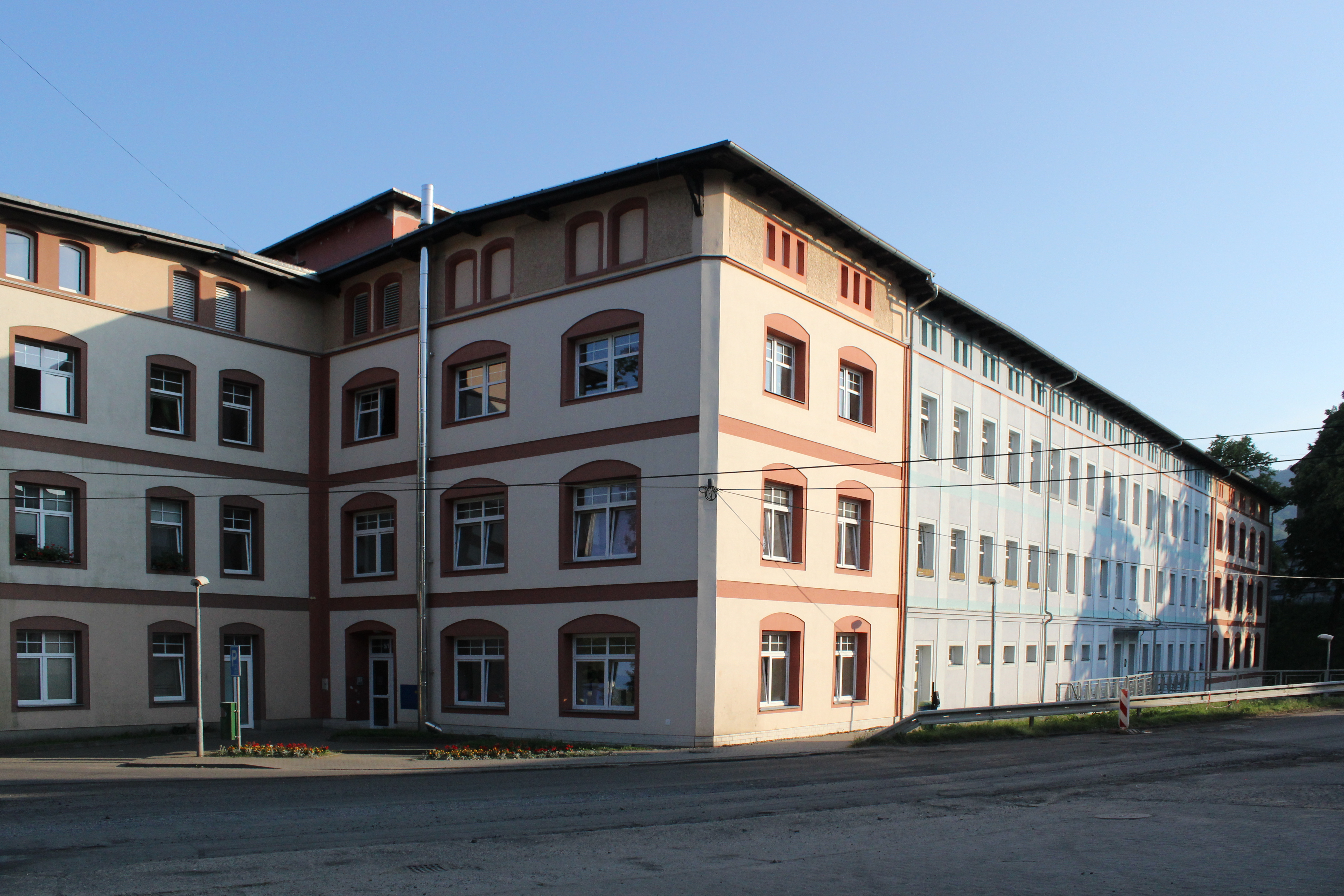 Někdejší průmyslový objekt číslo popisné 5 v Hejnicích přestavěný na byty.